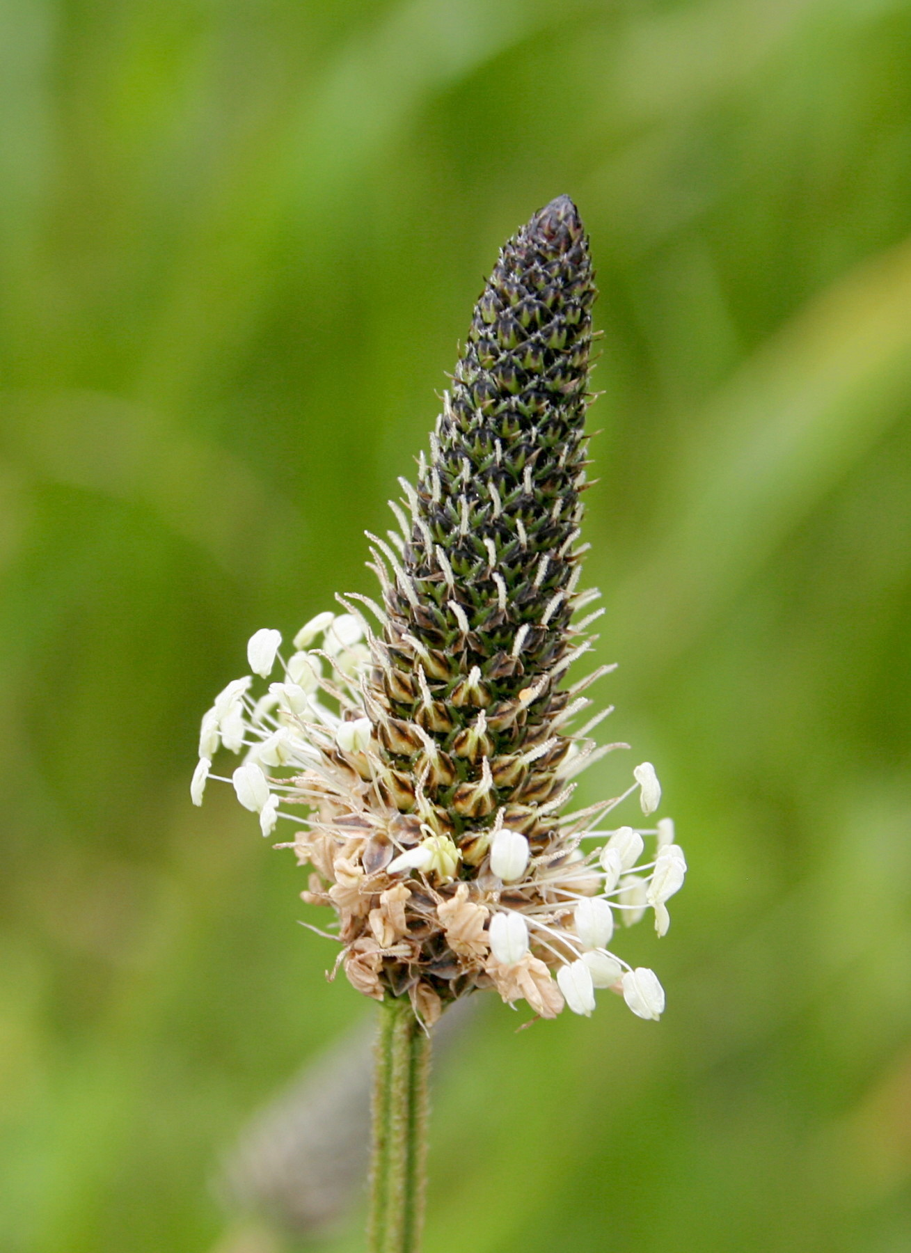 English Plantain (Plantago lanceolata)